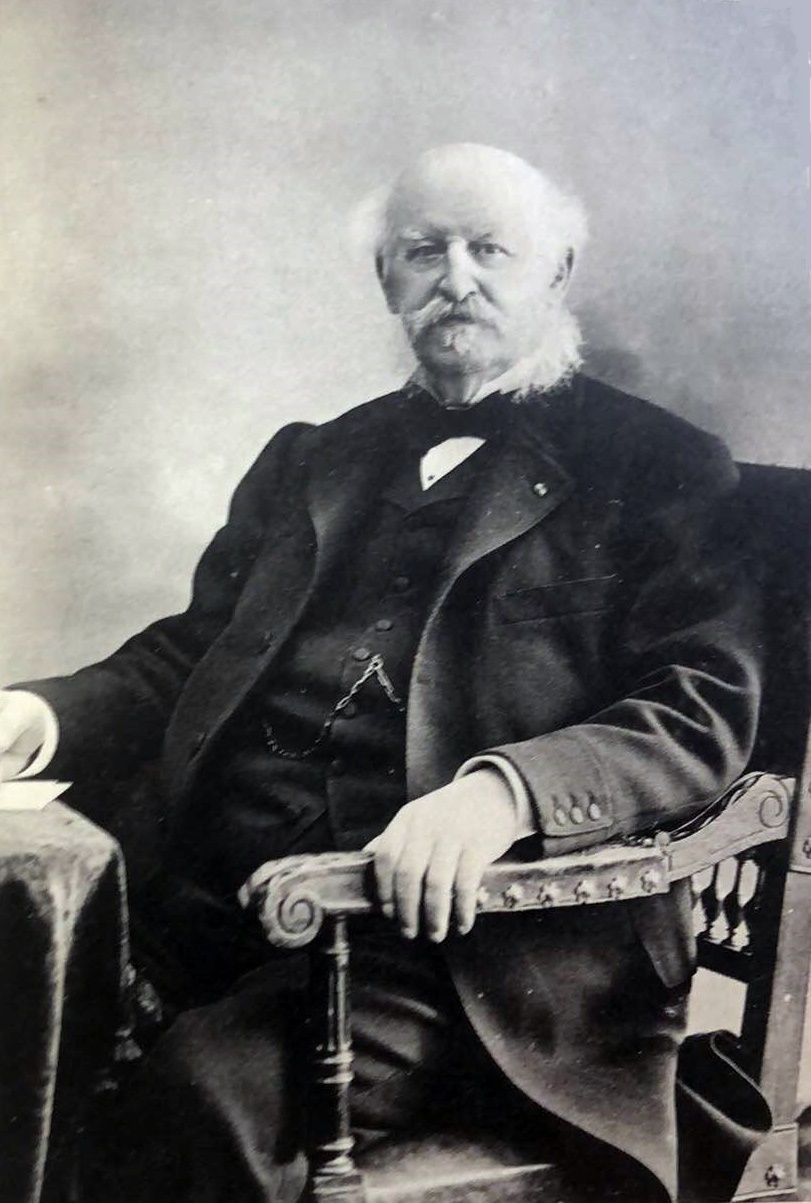 L'architecte Gustave Clausse (Collection particulière de Dominique Cler, arrière-arrière-petit-fils).